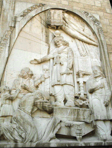 Basreliéf - realizace podle návrhu Ing. Arch. S. Sůvy